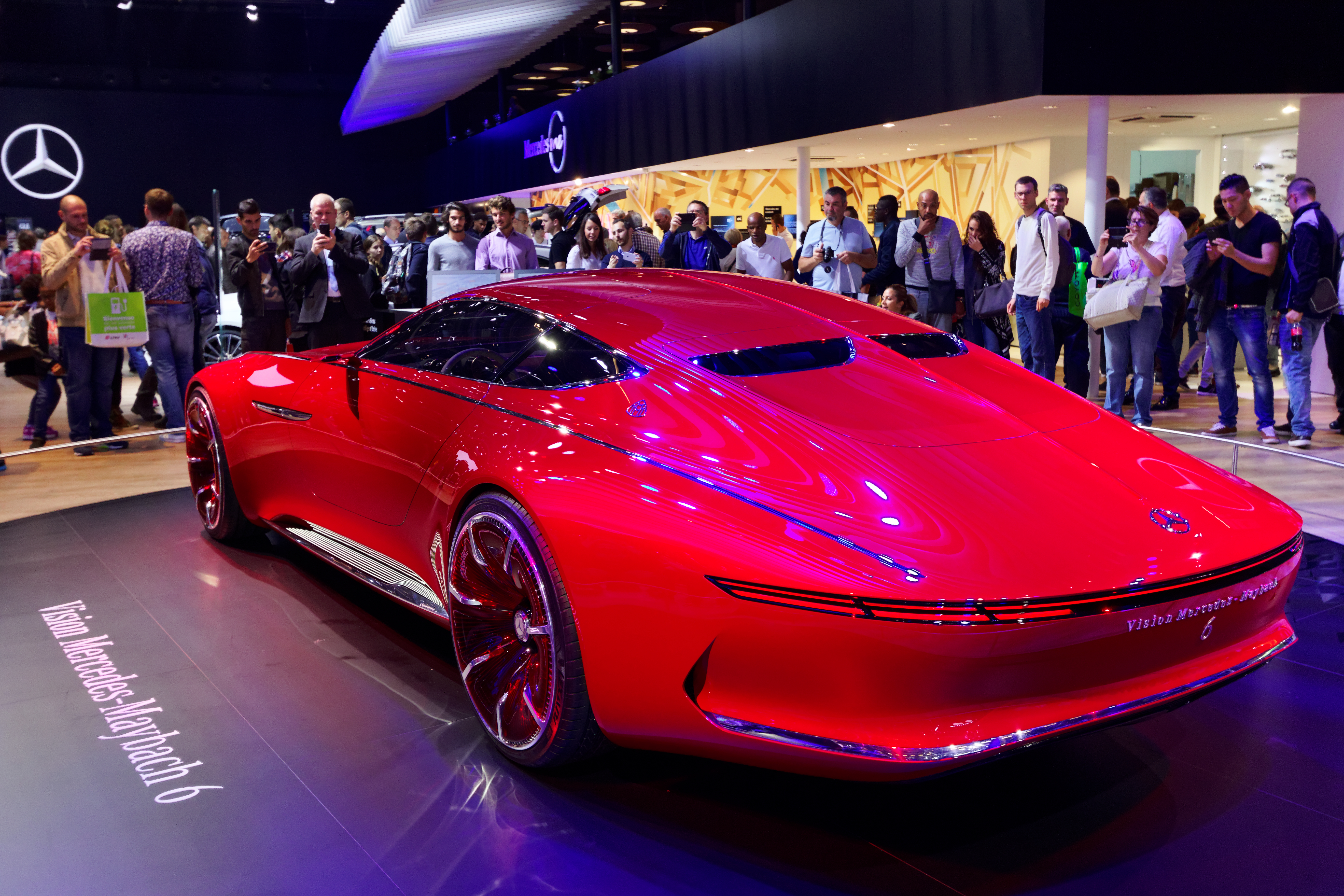 Une Vision Mercedes-Maybach 6 présentée lors du mondial de l'automobile de Paris 2016.